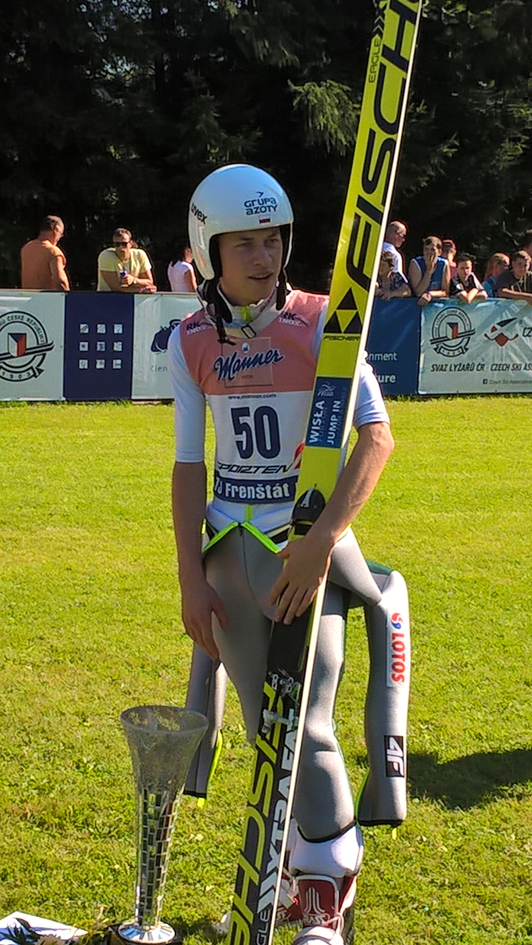 Aleksander Zniszczoł po zwycięstwie w zawodach Letniego Pucharu Kontynentalnego we Frenstacie podczas Memoriału Jiříego Raški w 2016 roku.